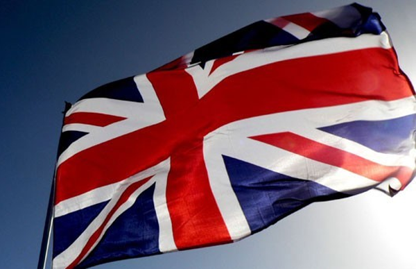 Ұлыбританияның туы - UNION JACK